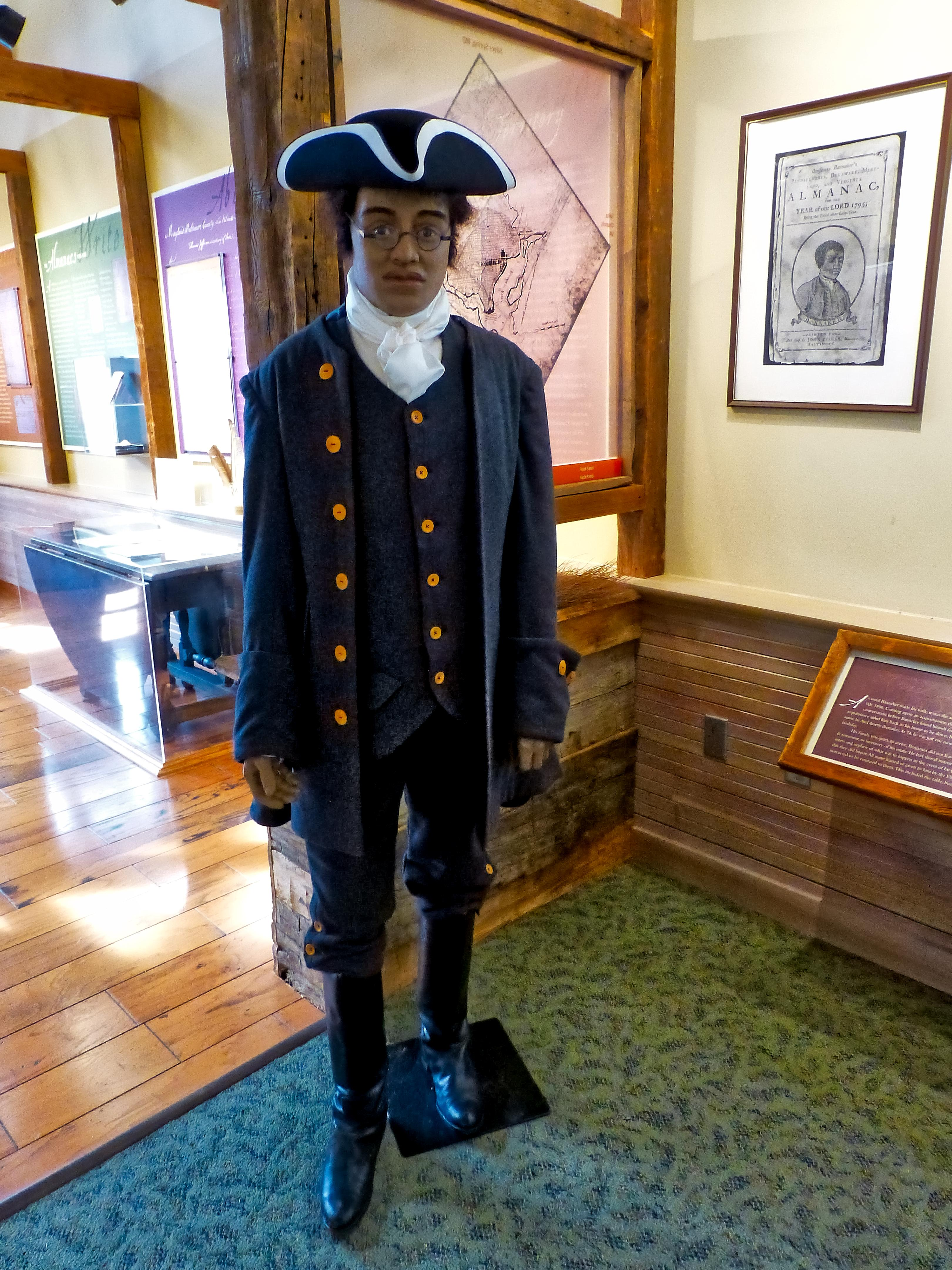 Benjamin Banneker Historical Park and Museum Feb 18, 2017, 1-034_edit